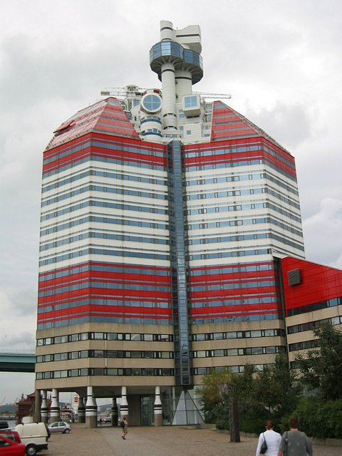 Utkiken-Turm im Hafen von Göteborg